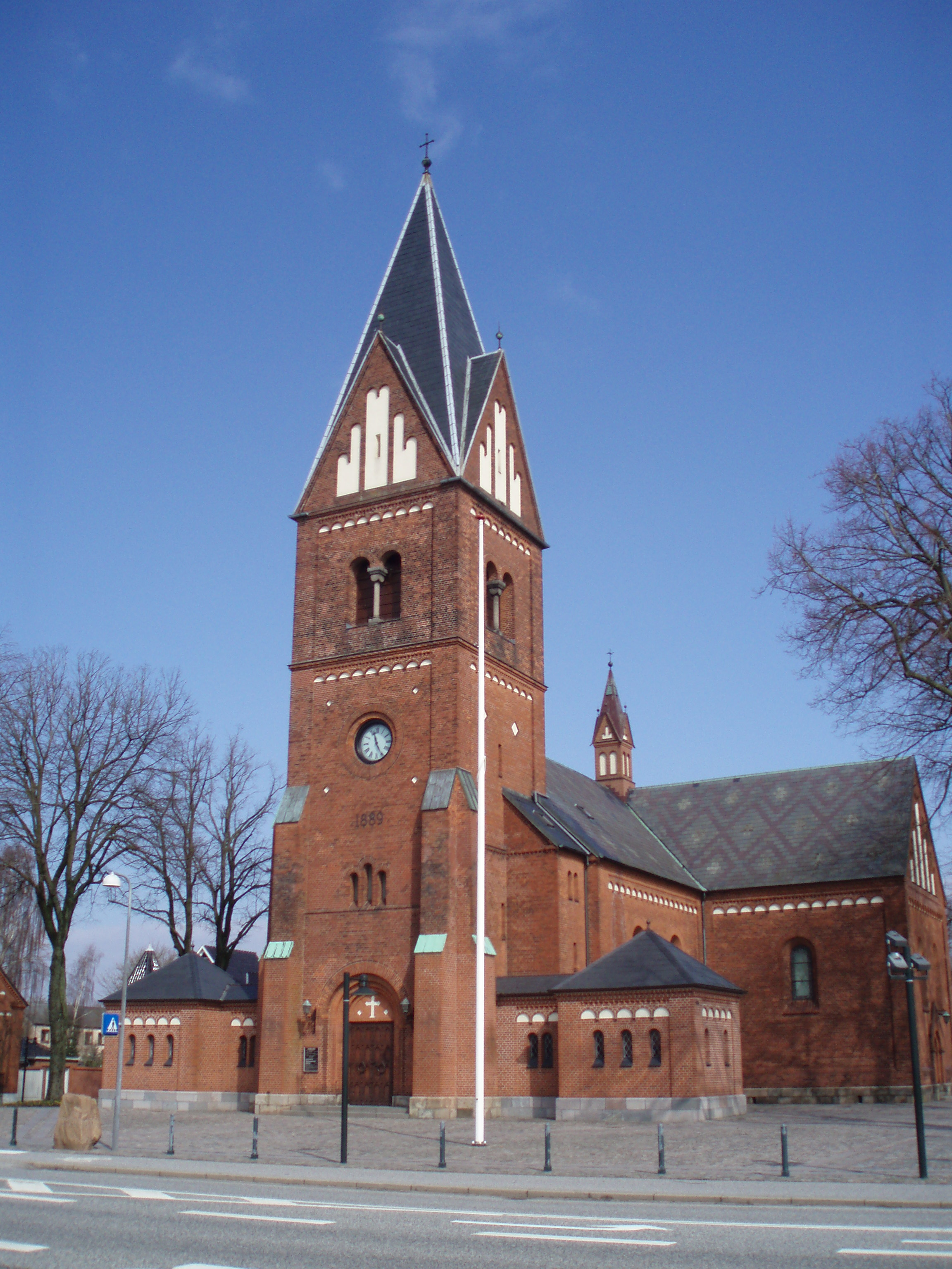 Herning Kirke in Herning, Denmark. Photographer: Brams.